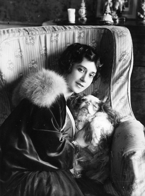 Карсавина, Тамара Платоновна